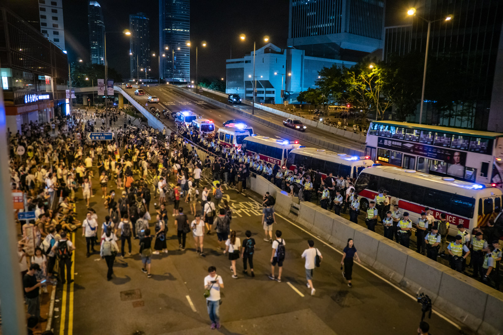 2019年6月反對逃犯條例修訂草案遊行，攝於夏愨道。對峙狀態。